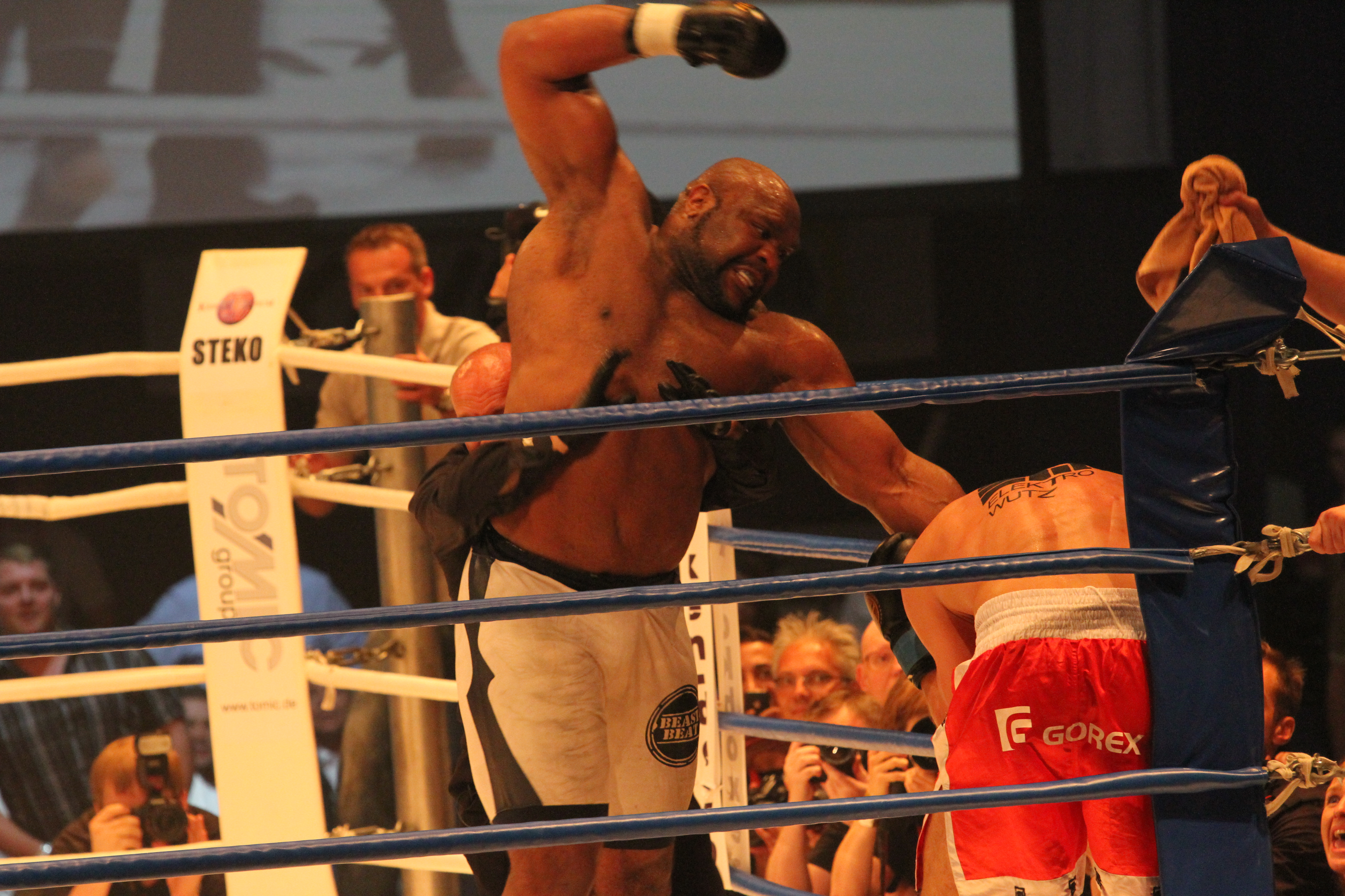 Bob Sapp, Thaiboxer